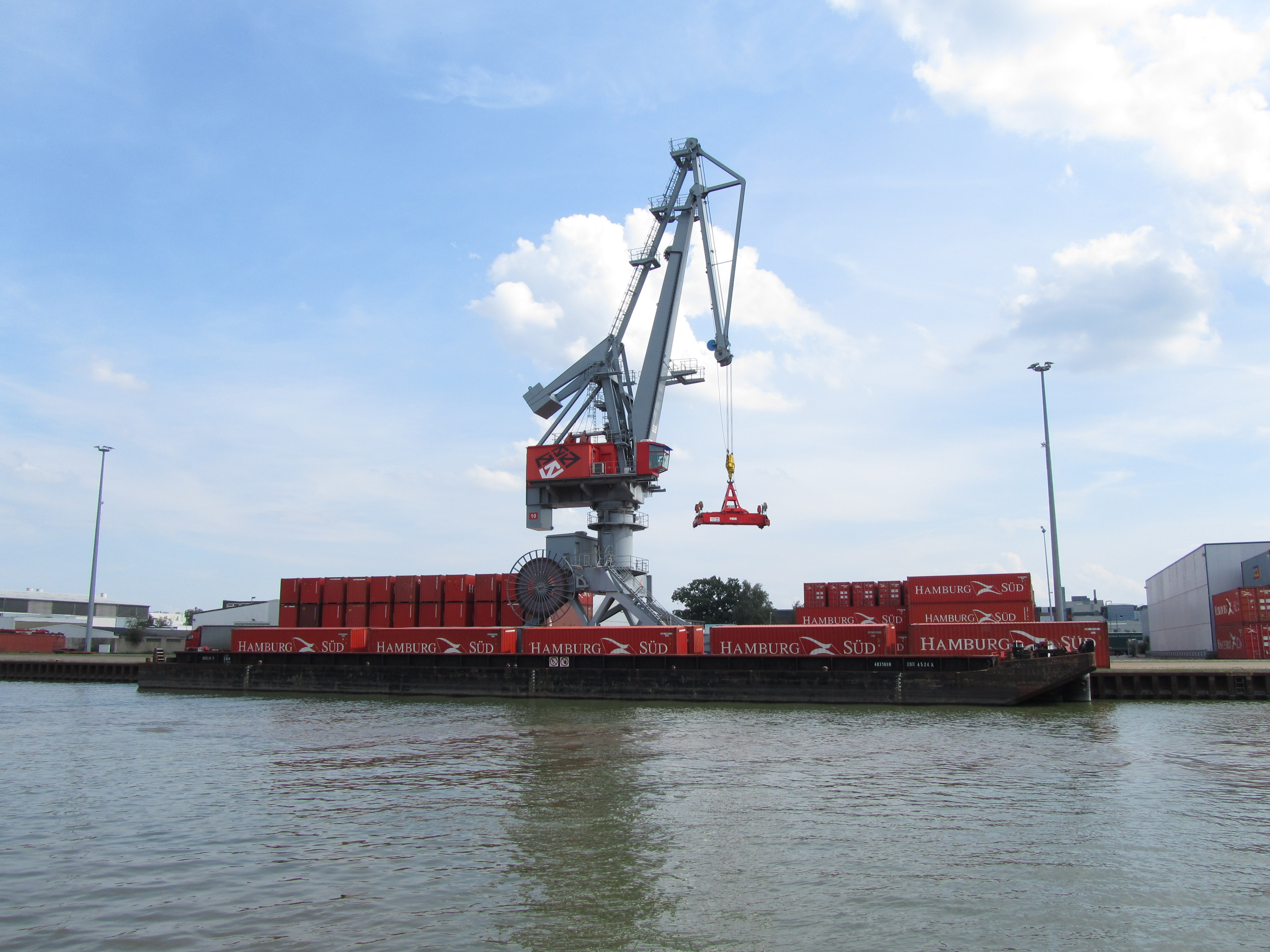 Containerumschlag im Binnenhafen Nordhafen in Hannover mit "Hamburg-Süd"-Containern